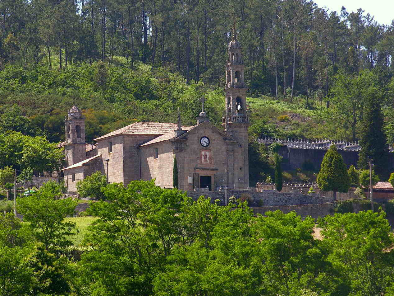 Igrexa de Bastavales (Brión, Galicia). Amentada por Rosalía de Castro en Cantares Gallegos Publish by: Luis Miguel Bugallo Sánchez Self made Foto tirada cunha Nikon E8800